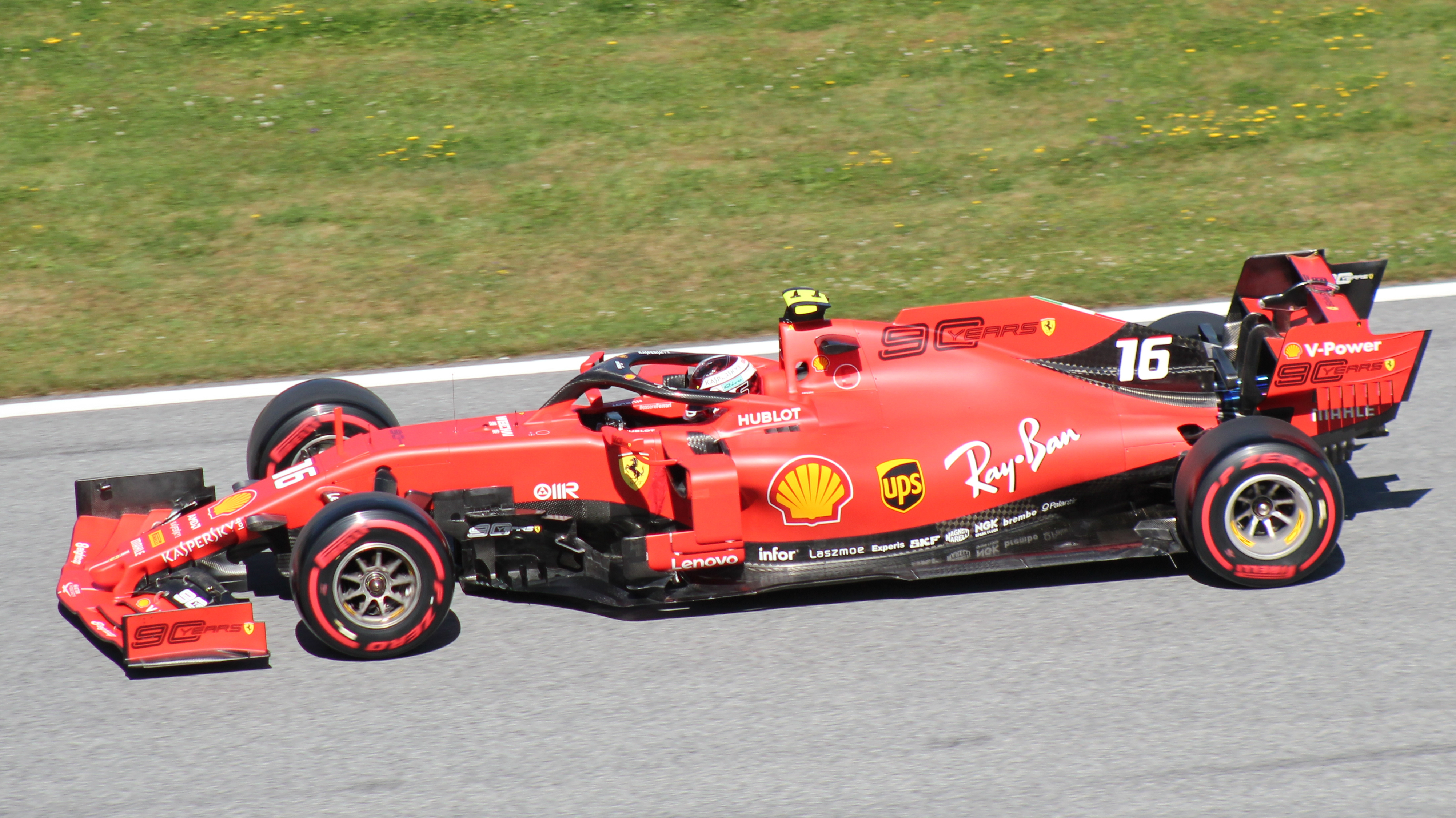 Leclerc beim Rennwochenende in Österreich 2019